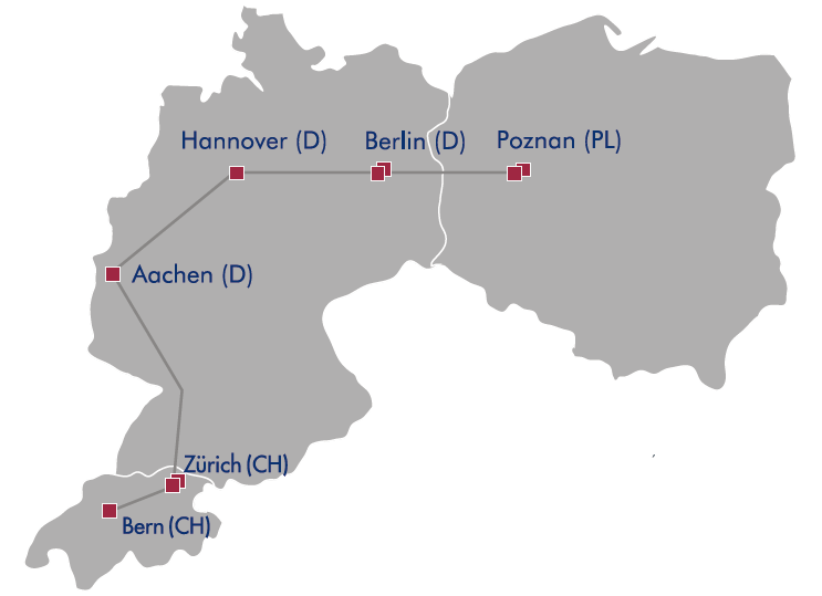 packaging group auf der Deutschlandkarte.